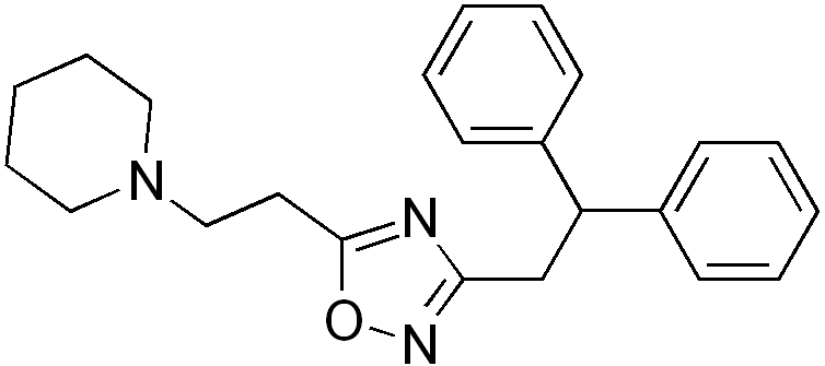 Chemical structure of prenoxdiazine